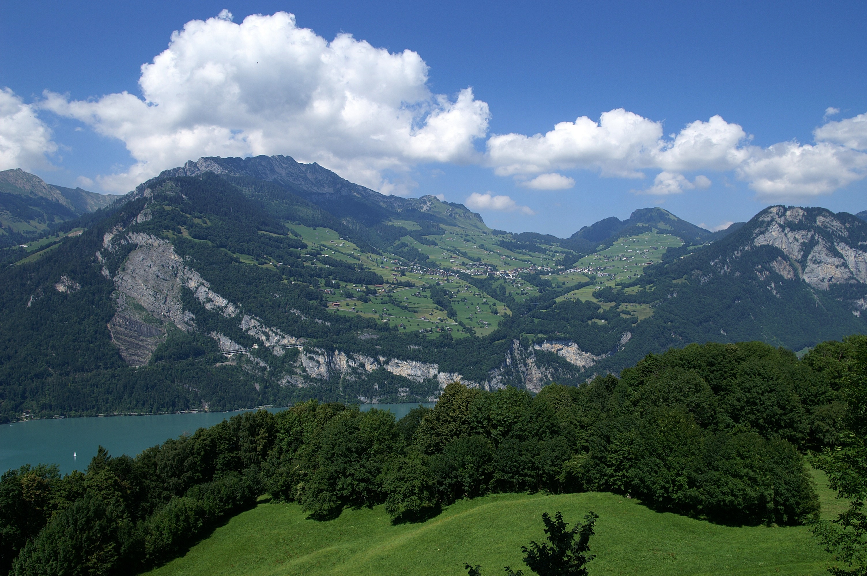 Amden ist eine politische Gemeinde im Kanton St. Gallen. Sie wird als „Sonnenterrasse“ des Walensees bezeichnet. Blick von Filzbach, auf dem Kerenzerberges.